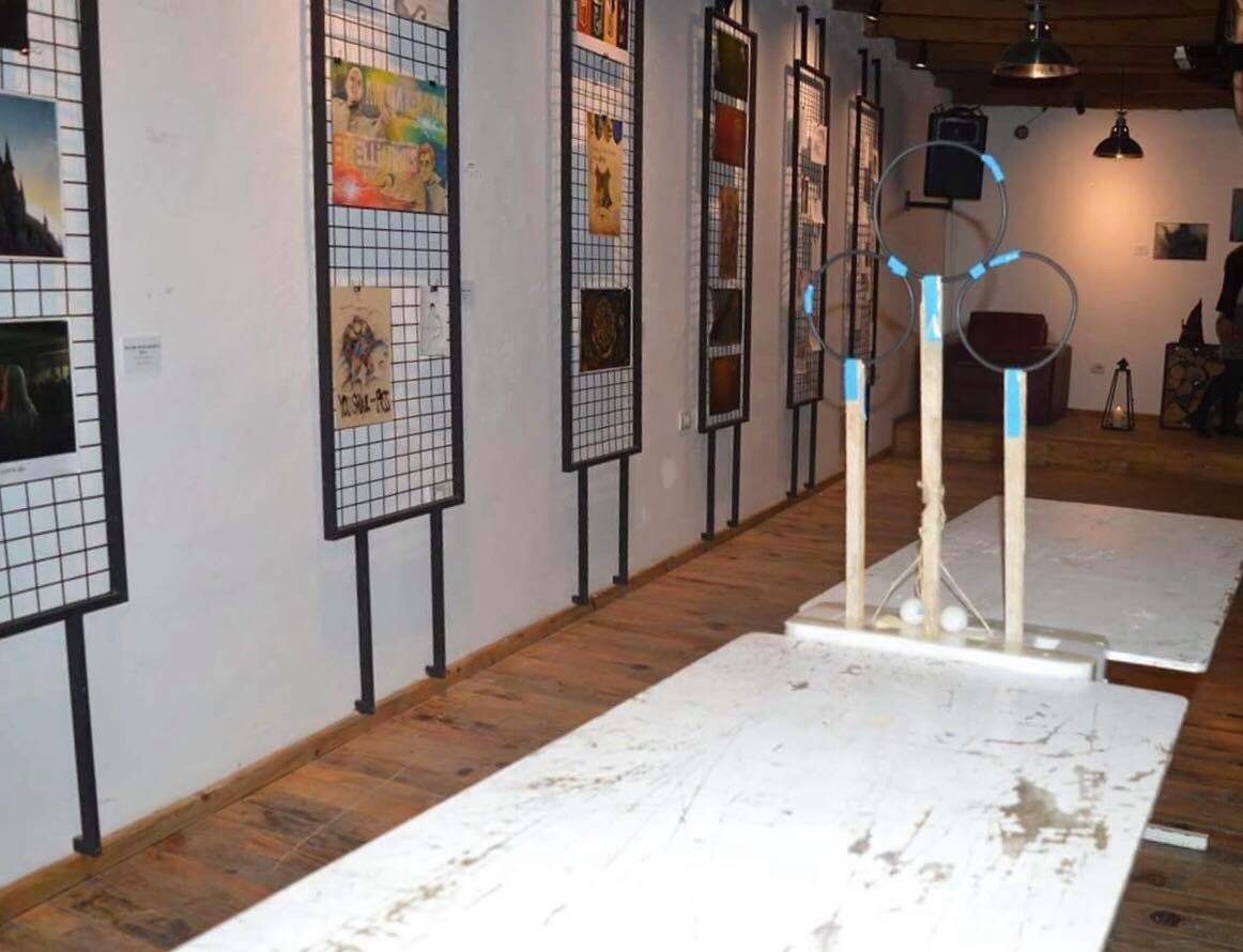 Quidditch Beer Pong, lojë frymëzuar nga Harry Potter.